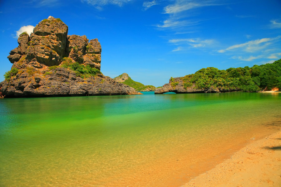 Бирюзовый берег